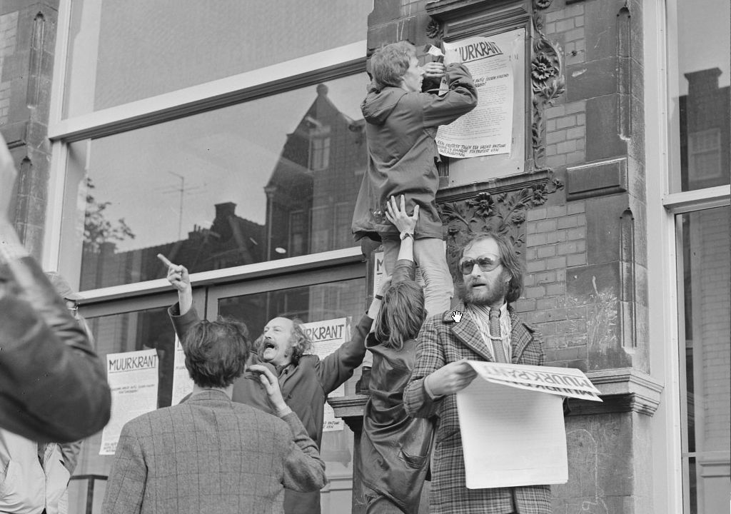 Rob Mierenet - Anefo: Ernst Vijlbrief - Aktie Muurkrant Stedelijk Museum, 1969 (crop)